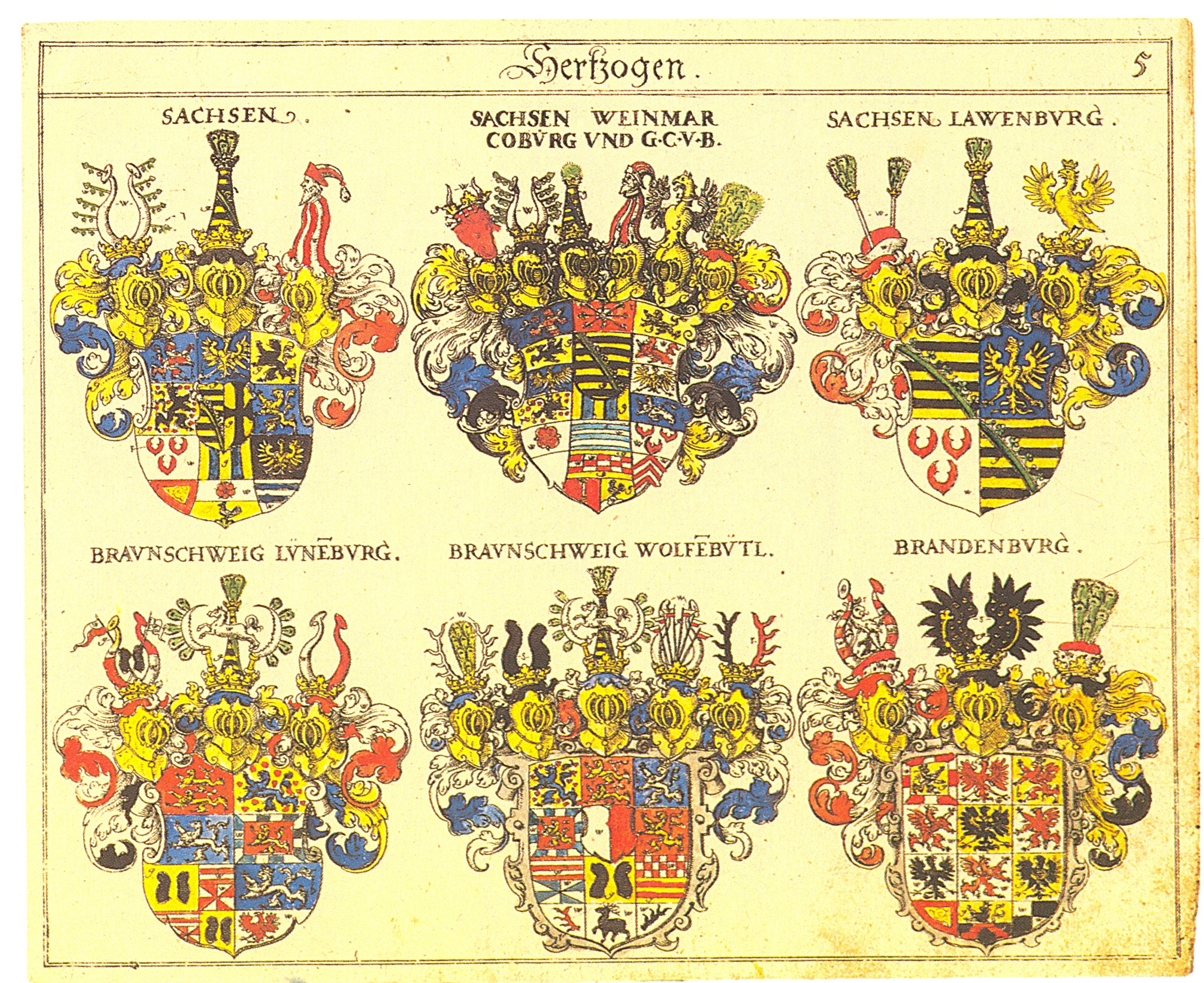 Johann Siebmacher: New Wappenbuch Herzöge Blatt 5